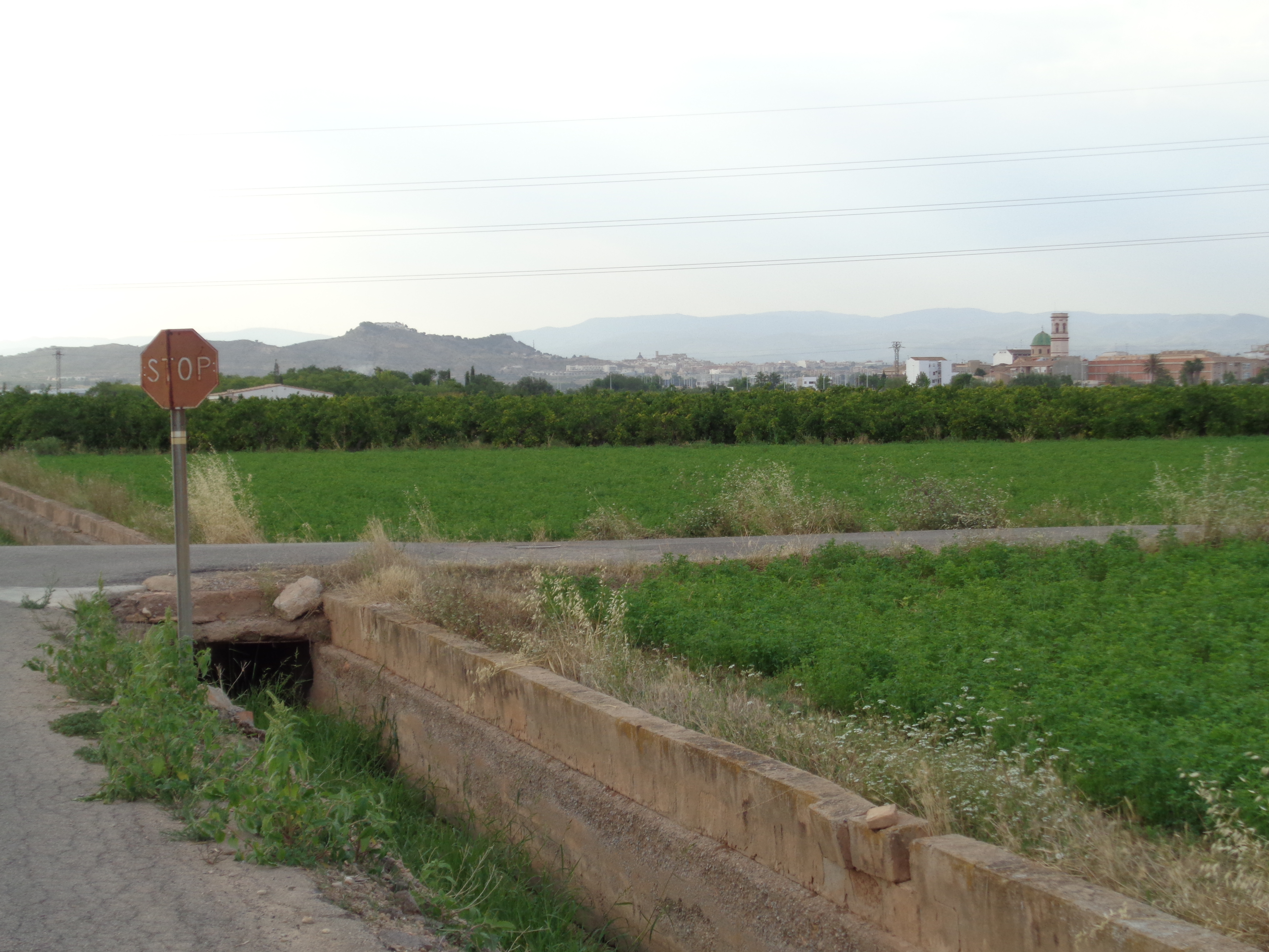 La Pobla de Vallbona.